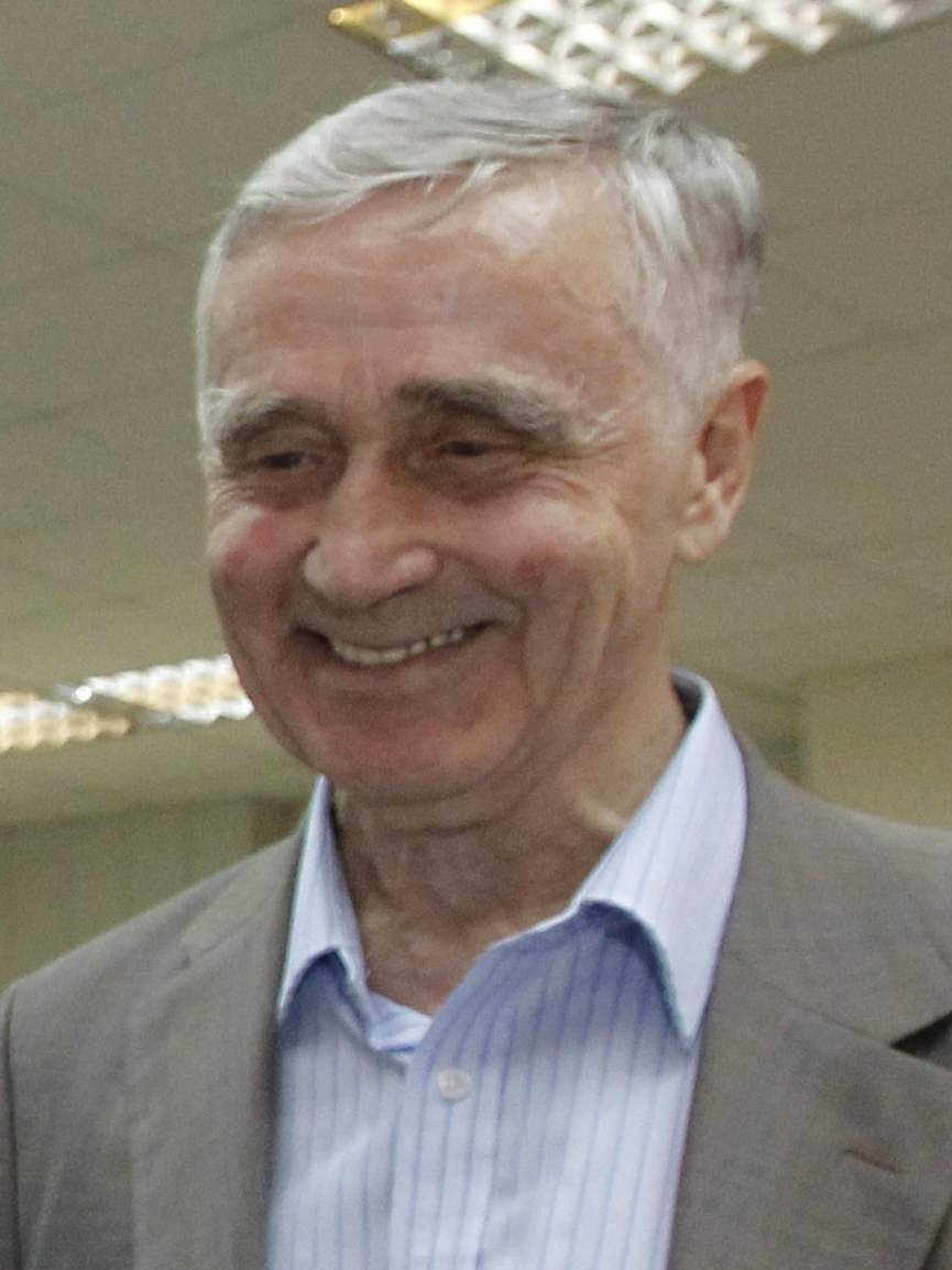 Александр Николаевич Скринский, академик РАН, член Президиума РАН; директор Института ядерной физики им. Г.И.Будкера Сибирского отделения РАН.